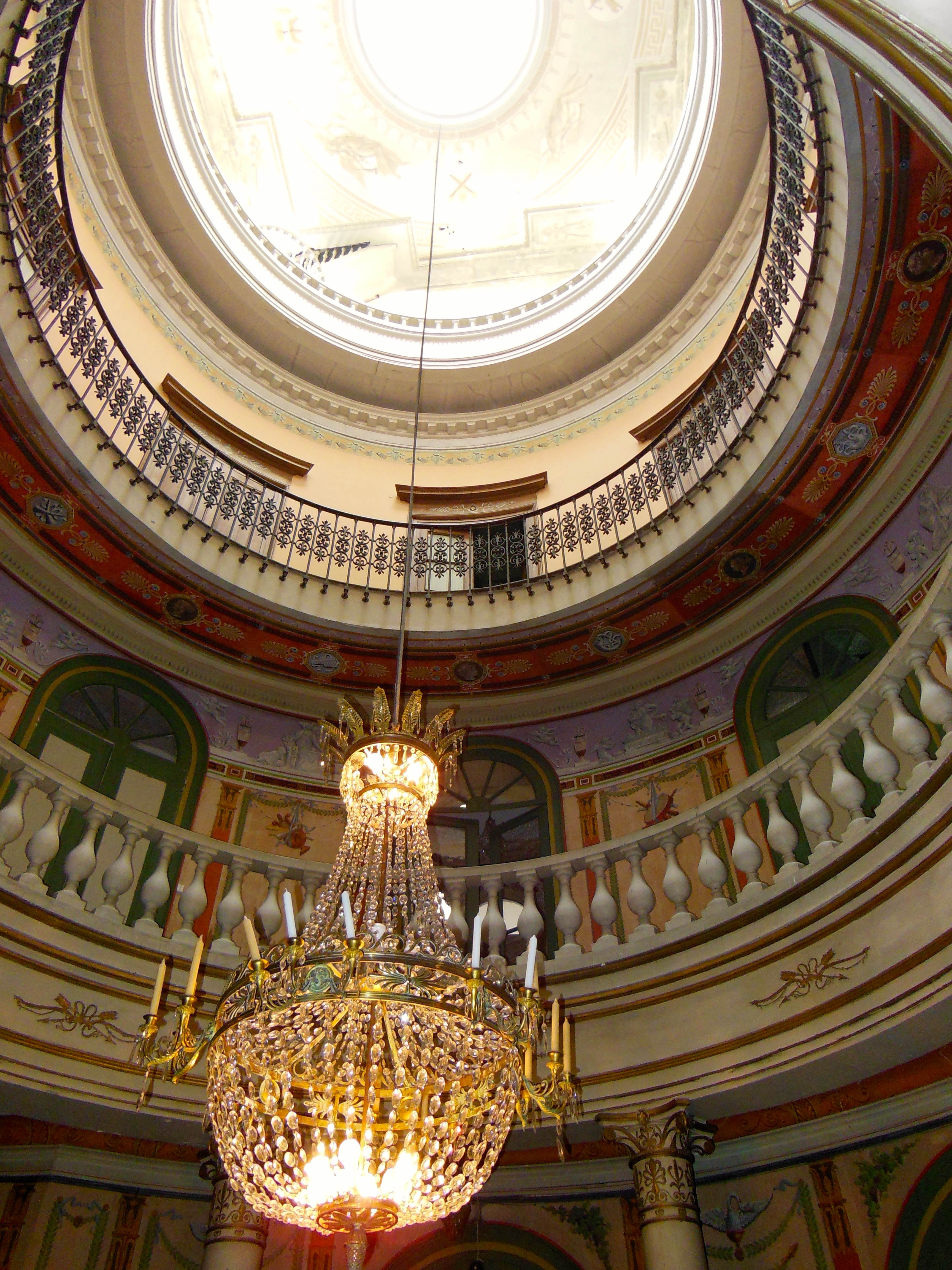 La rotonde de la Villa Palladienne de Syam (Jura)